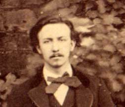 Émile Nouguier (Emile Toussaint Michel NOUGUIER (1840-1898)), ingénieur (entres autres, à l'origine de la Tour Eiffel.